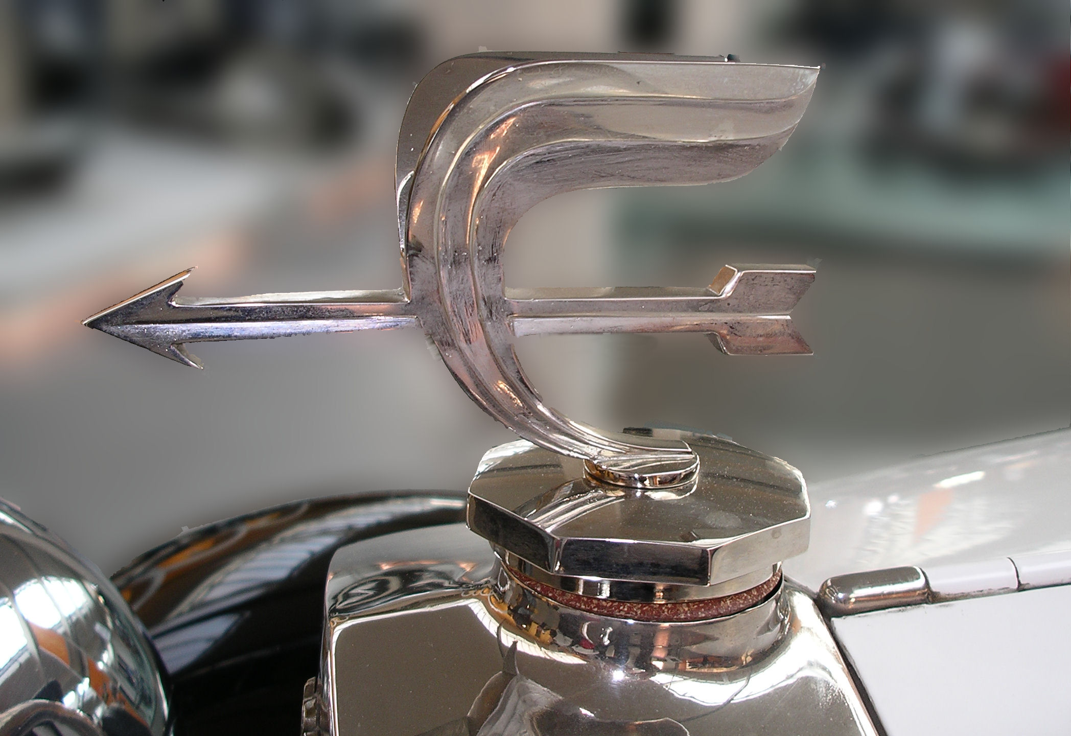 Die erste Kühlerfigur von August Horchs Luxusfahrzeugen symbolisiert Flügel und einen Pfeil. Das Fahrzeug steht im August-Horch-Museum in Zwickau [1 .